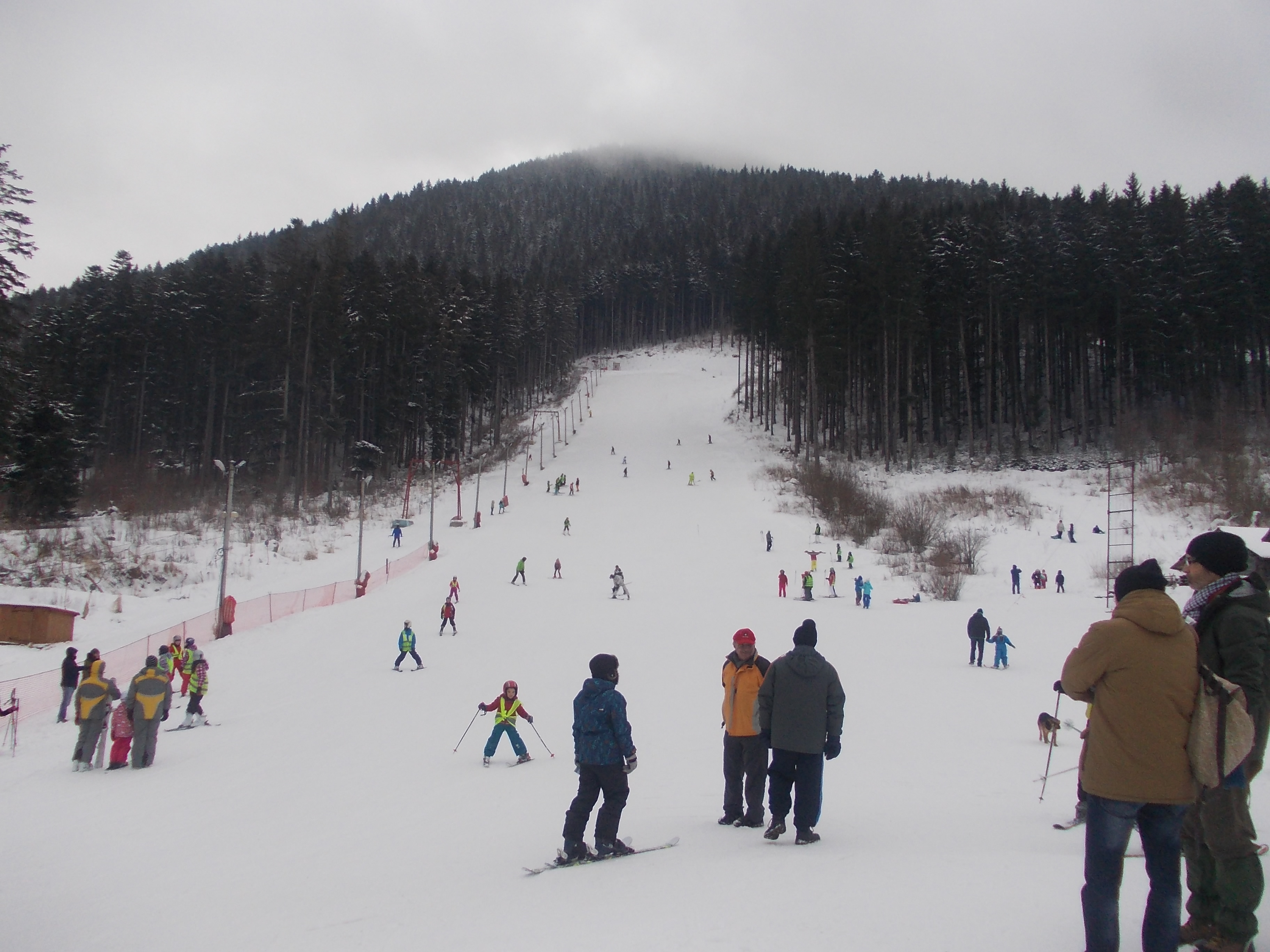 pârtie de schi în Băile Tuşnad